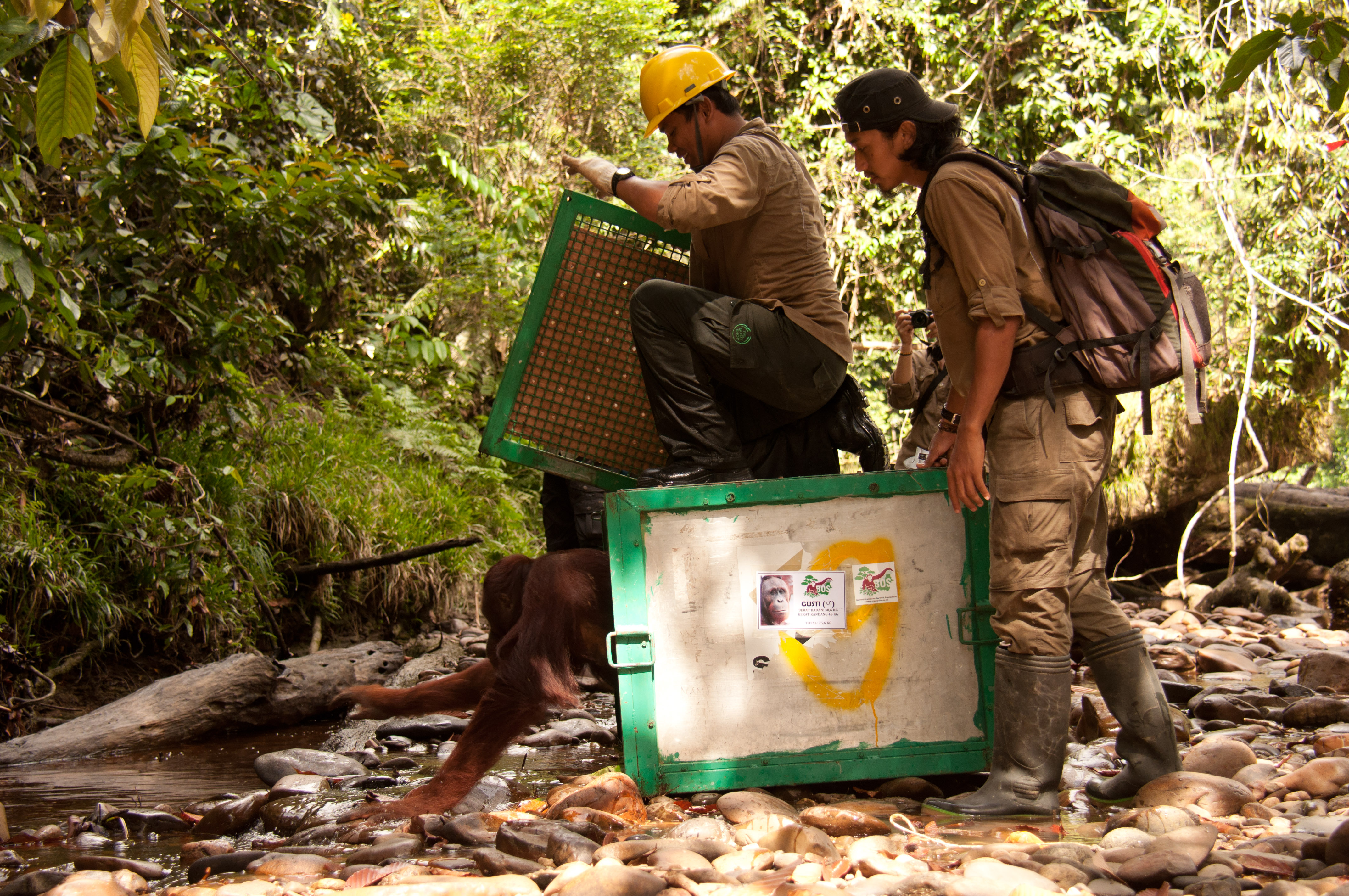 Die Auswilderung eines Orang-Utans durch die BOS Foundation in Borneo.